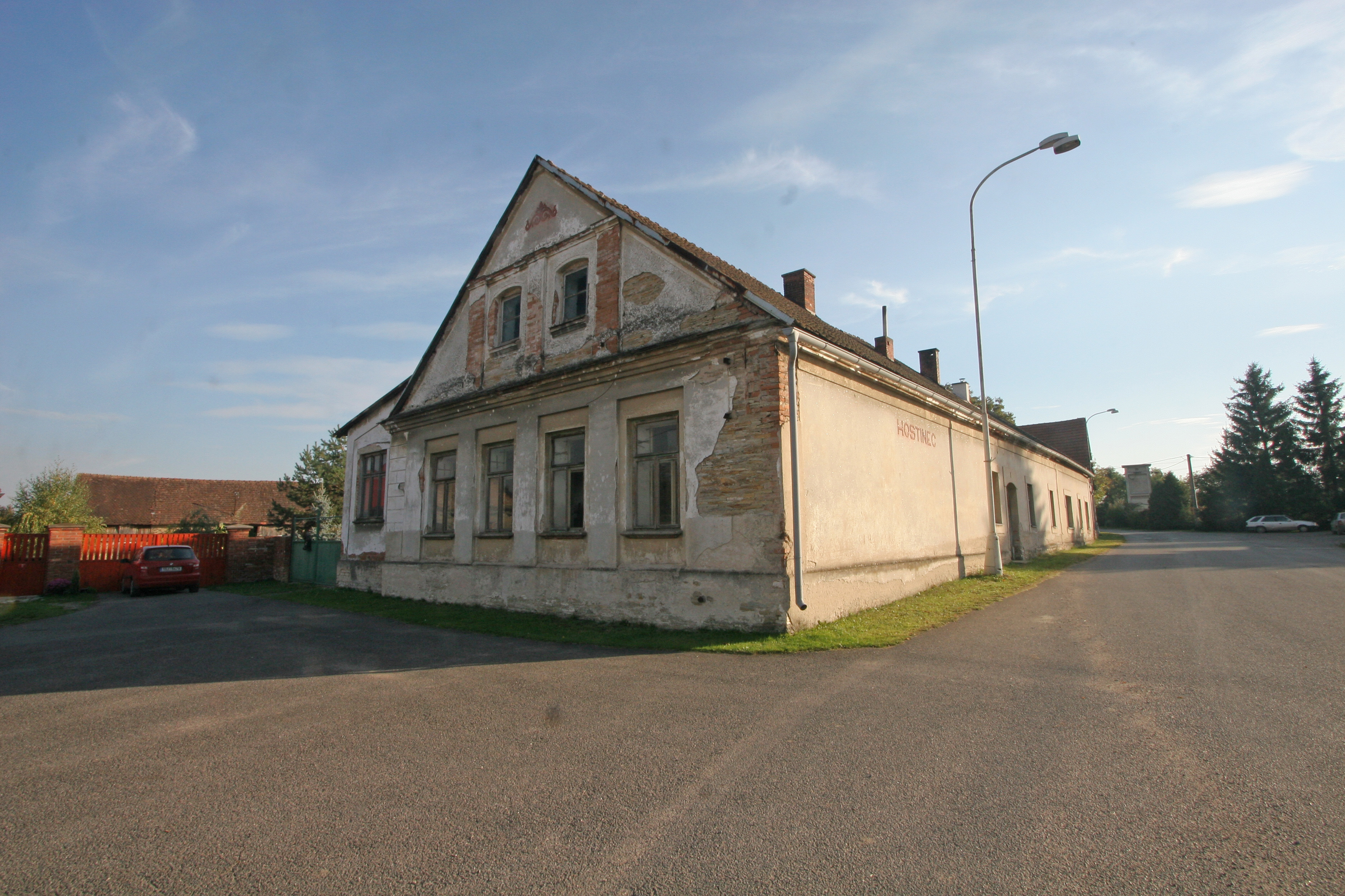 Skršice stará hospoda